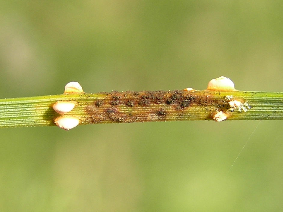 Coleosporium tussilaginis on Pinus sylvestris, Białowieża, Polska